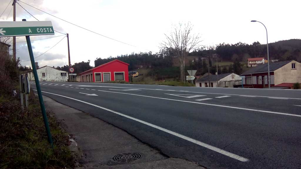 Vista de Bouzaredonda, Anca, Neda.